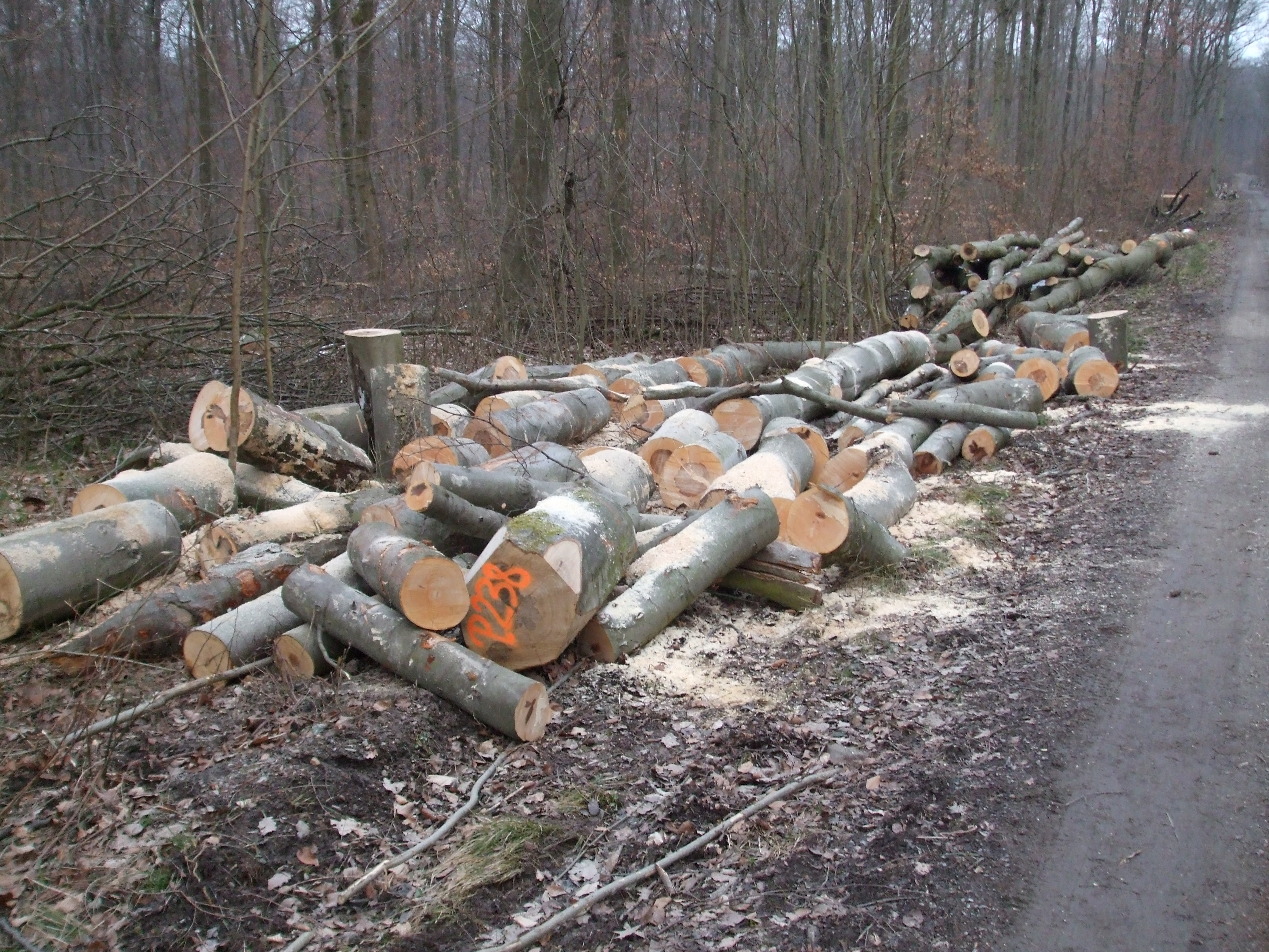 Holzpolder (Polter), der in Bearbeitung ist, zersägt auf handliche Stücke (Buchenholz). Markierung „P.238“ = Polter-Nr. 238 (Verkaufsnummer)